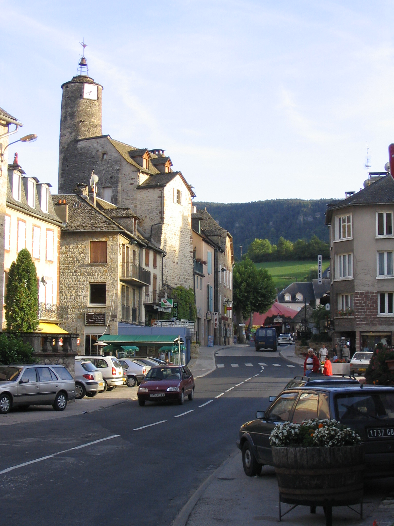 La Canourgue, France